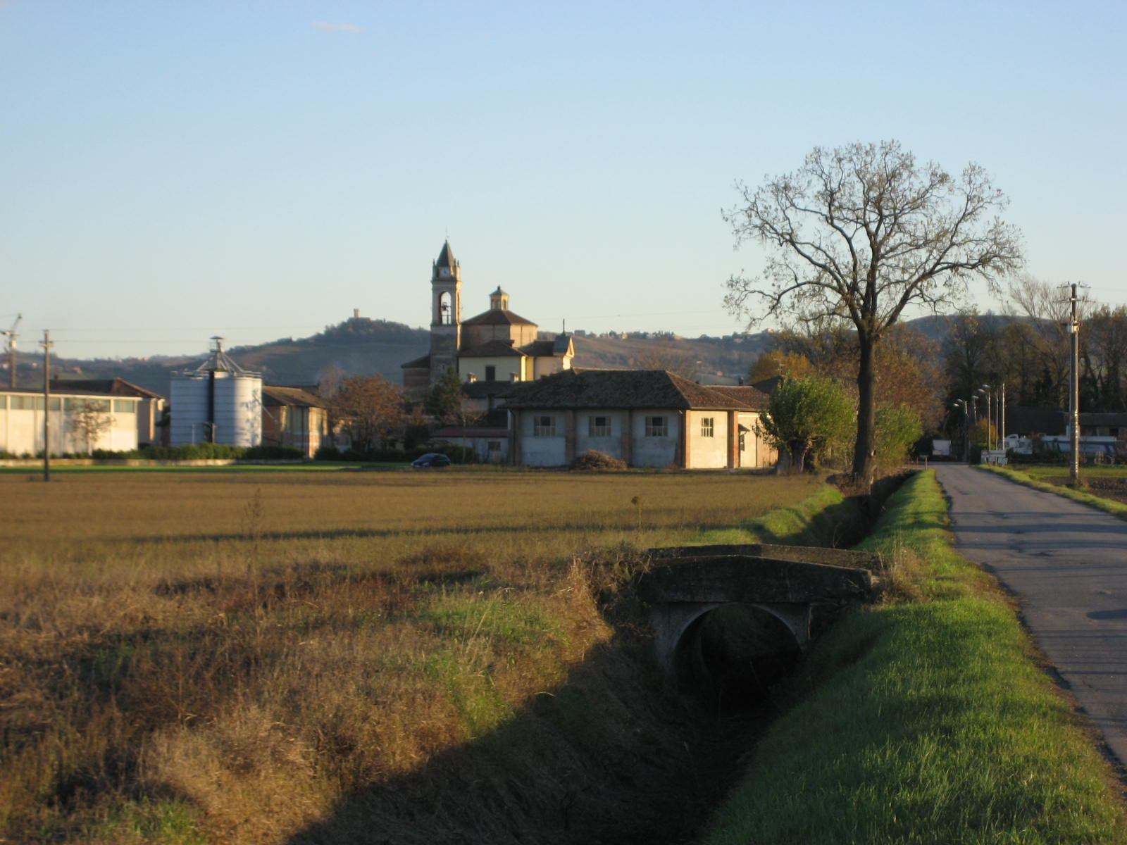 Veduta di Barbianello